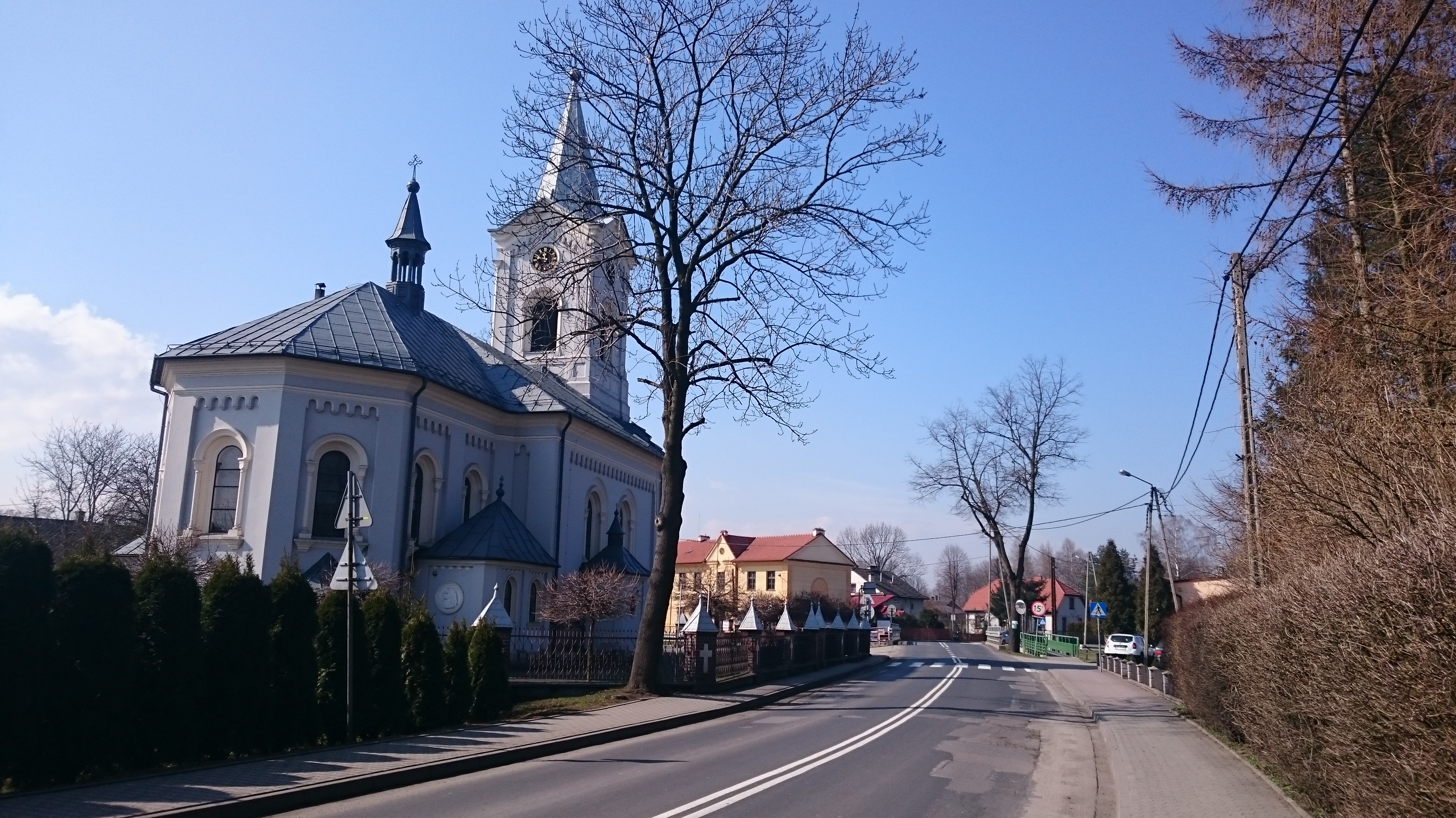 Hecznarowice, ul. Krakowska